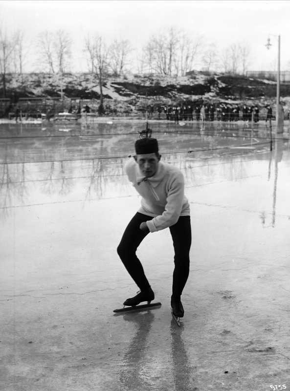 Skøyteløperen Magnus Johansen, skøyteløp, start, skøyteløper, mann, publikum.